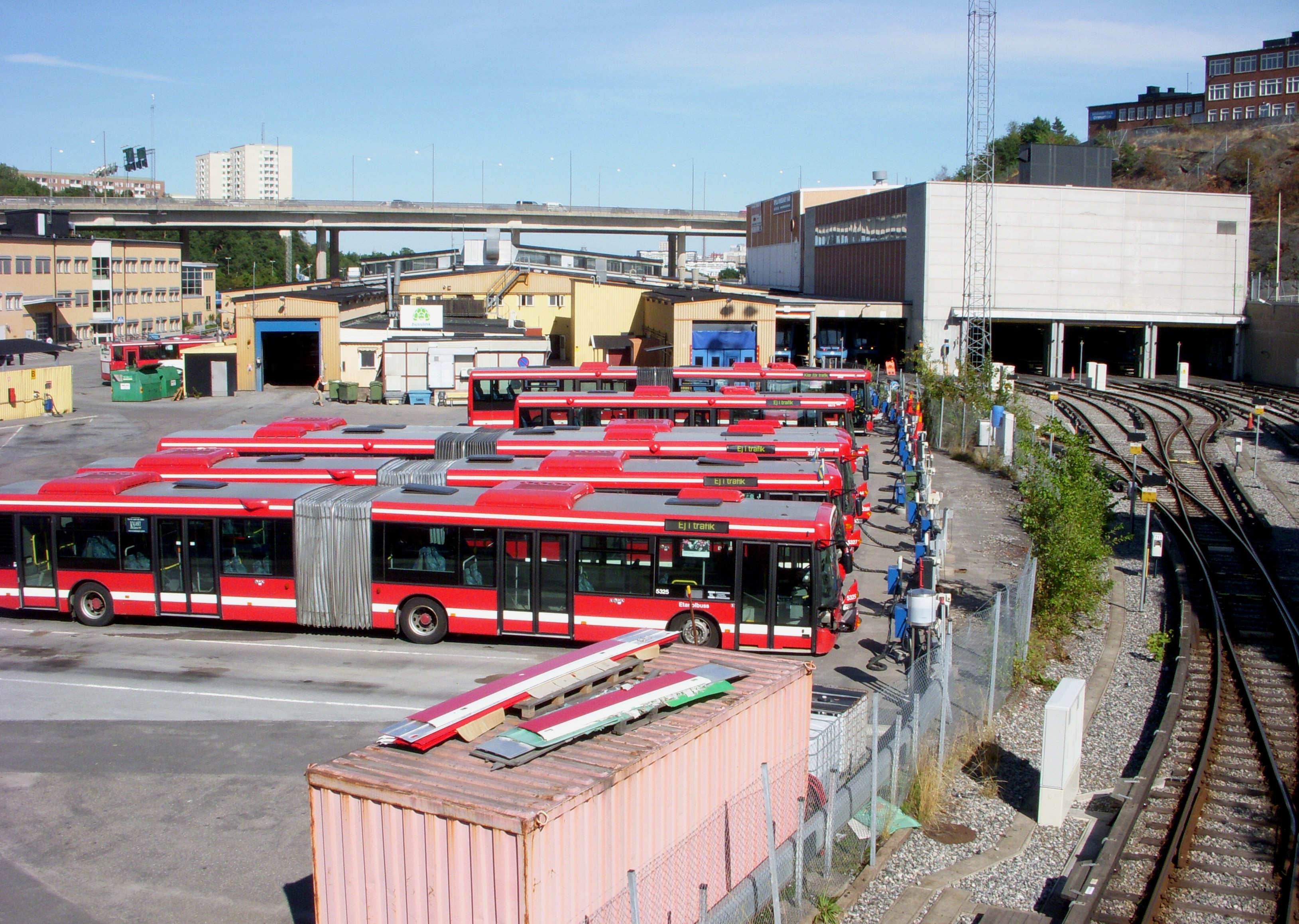 Nybodadepån, Stockholm